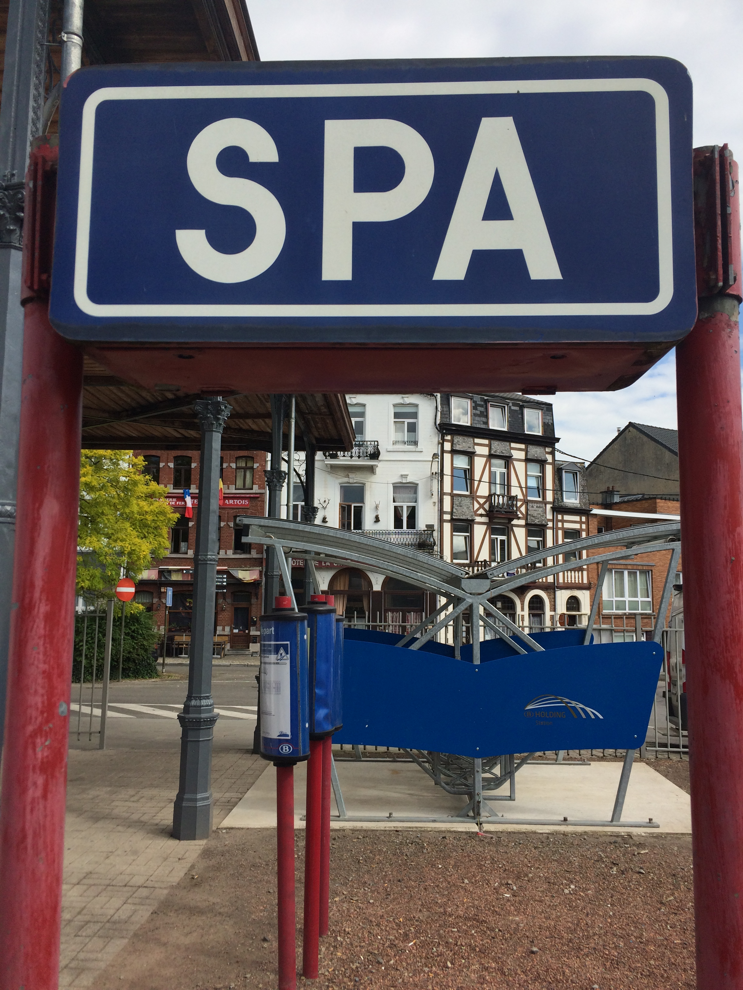 Bahnhof Spa, Beschilderung